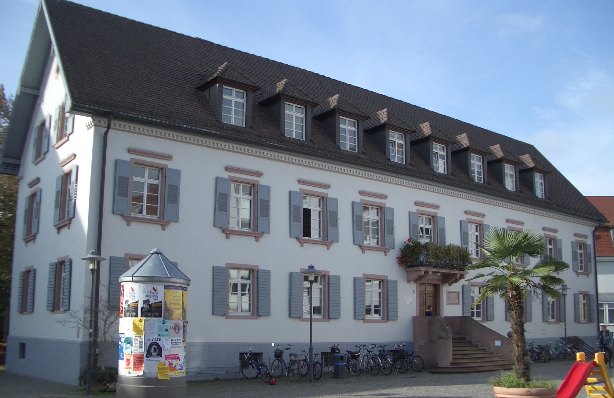 Schlosserhaus, ehemaliger Wohnsitz in Emmendingen. Der vormalige Grempp'scher Hof kam 1588 in den Besitz der Markgrafen von Baden und war seit dieser Zeit Wohnsitz für die Oberbeamten der Markgrafschaft Hachbarg. Hier lebte und starb Cornelia Schlosser (1774-77), Gattin des Oberamtmanns Johann Georg Schlosser, der 1774-87 in Emmendingen wirkte. Nach Verkauf Nutzung als Brauereigaststätte. Erstes Haus in Emmendingen mit elektrischer Beleuchtung. Heutige Nutzung als Stadtbibliothek.